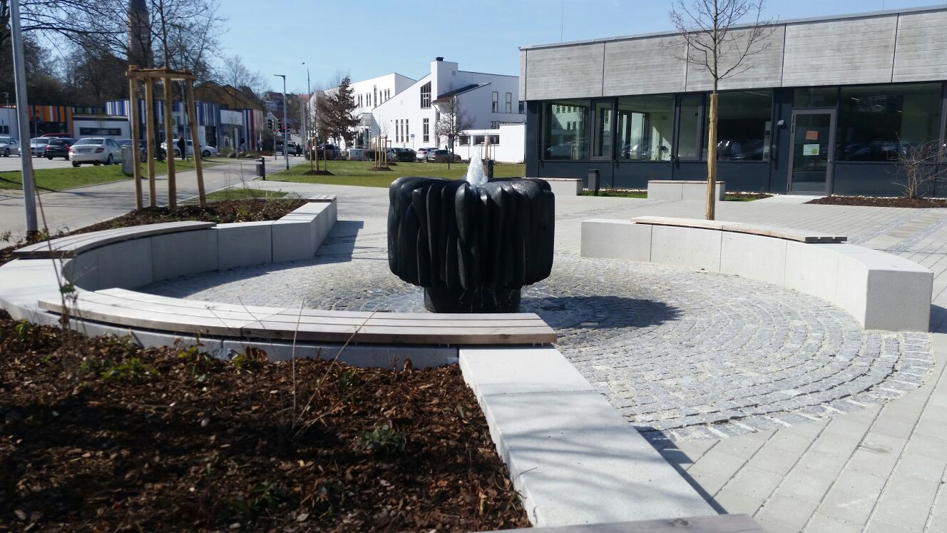 Frühwerk (1973) des Bildhauers Josef Michael Neustifter, 2016-2017 im Rahmen der Generalsanierung des Gymnasiums erneuert und in einen neuen Kontext gesetzt.